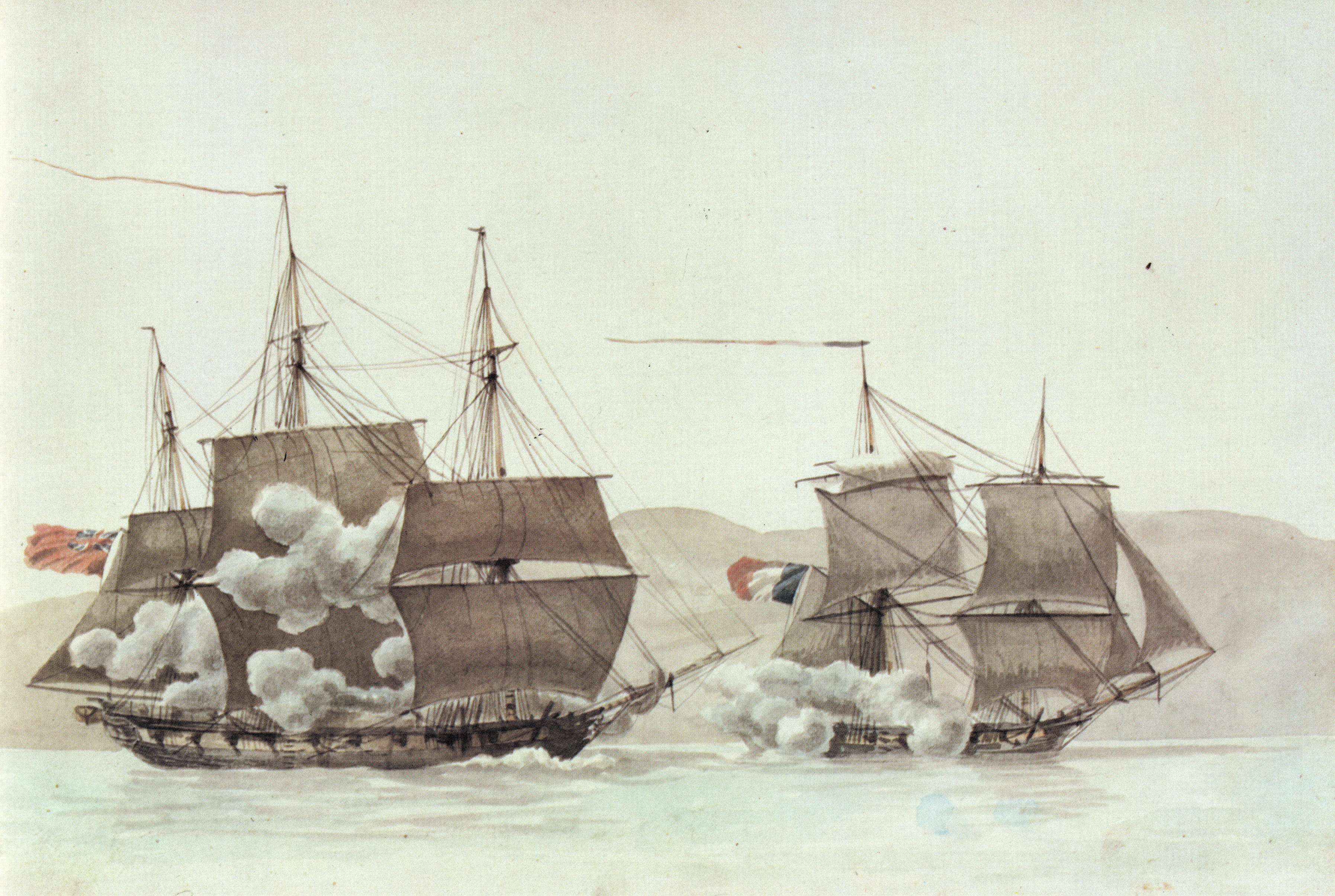 Battle between Ligurienne and HMS Peterel, 30 Ventôse an VIII (21 March 1800).